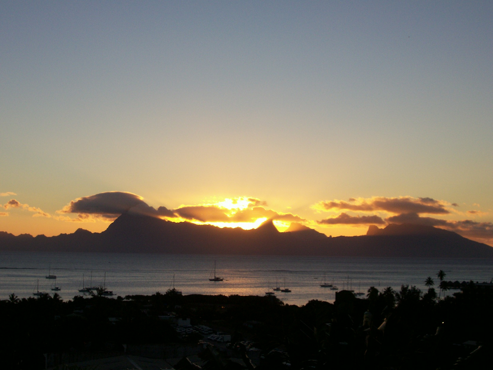 Il s'agit d'une vue de l'île de Moorea prise depuis la commune de Punaauia, à Tahiti.